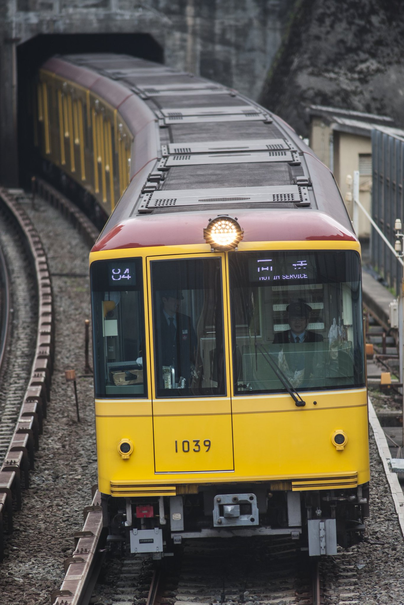 東京メトロ銀座線1000系1139編成